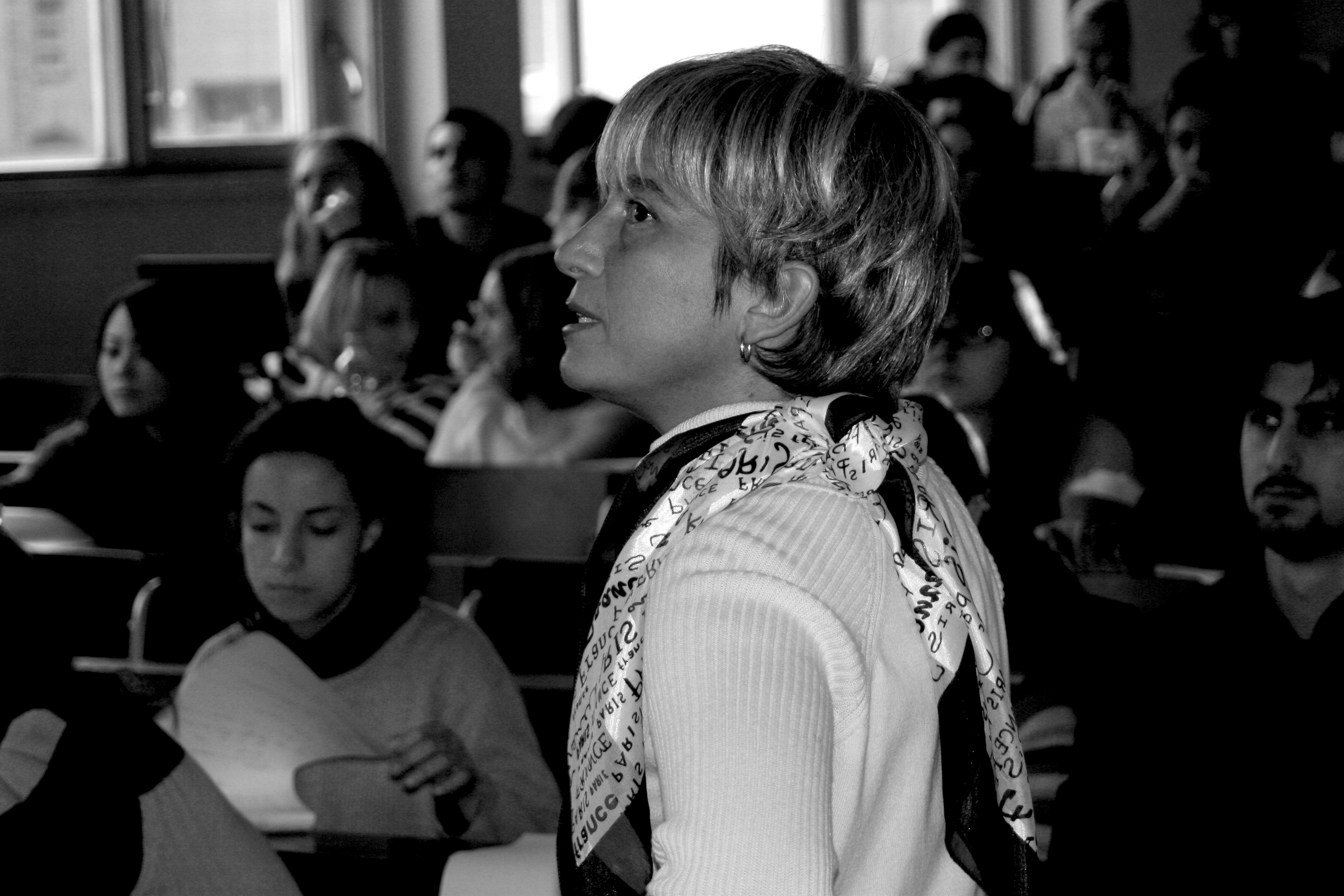 ლექციაზე. გოეთეს უნივერსიტეტი (ფრანკფურტი).